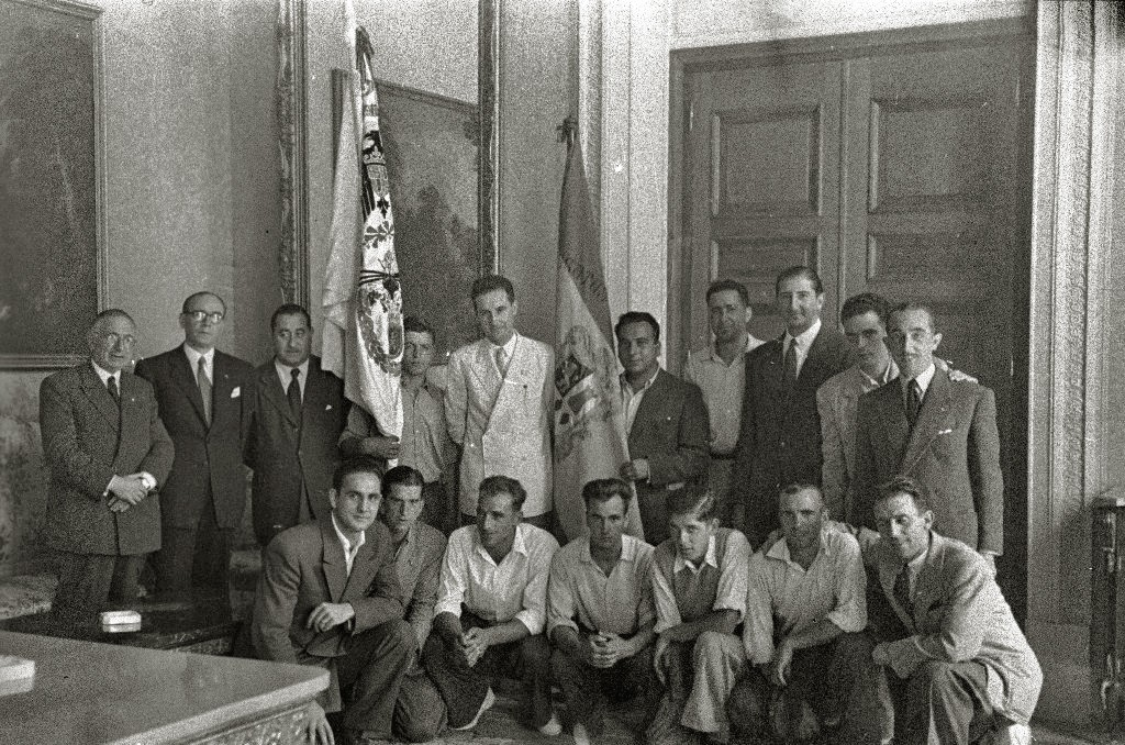 El alcalde de San Sebastián Félix Azpilicueta y otras autoridades junto a la tripulación de la trainera del Club de Remo Esperanza